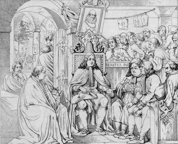 Julius Nisle, Der Statthalter von Schopfheim, Blatt VI: „Nu, se sagi Jo, ‘s Regiere chunnt mi nit suur a“ (Nu, so sag ich: Ja! ‘s Regieren kommt mir nicht saur an), 1845. – Nach einer Radierung von Sophie Reinhard. – Links am Bildrand: Selbstbildnis von Julius Nisle.